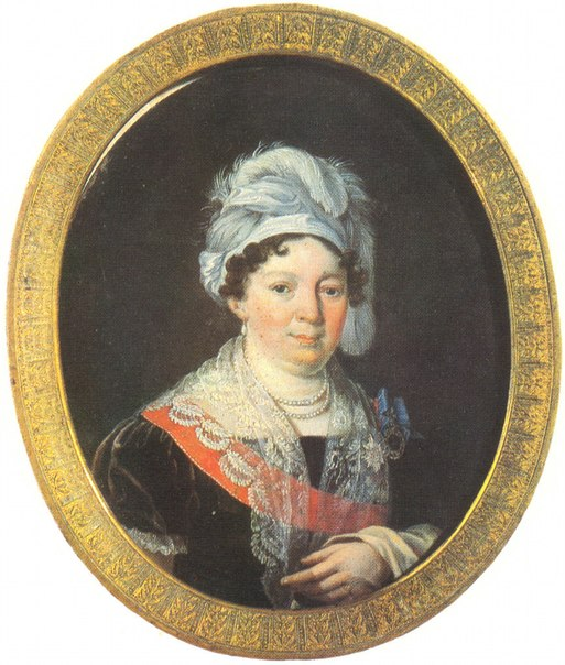 Св. княгиня Екатерина Николаевна Лопухина